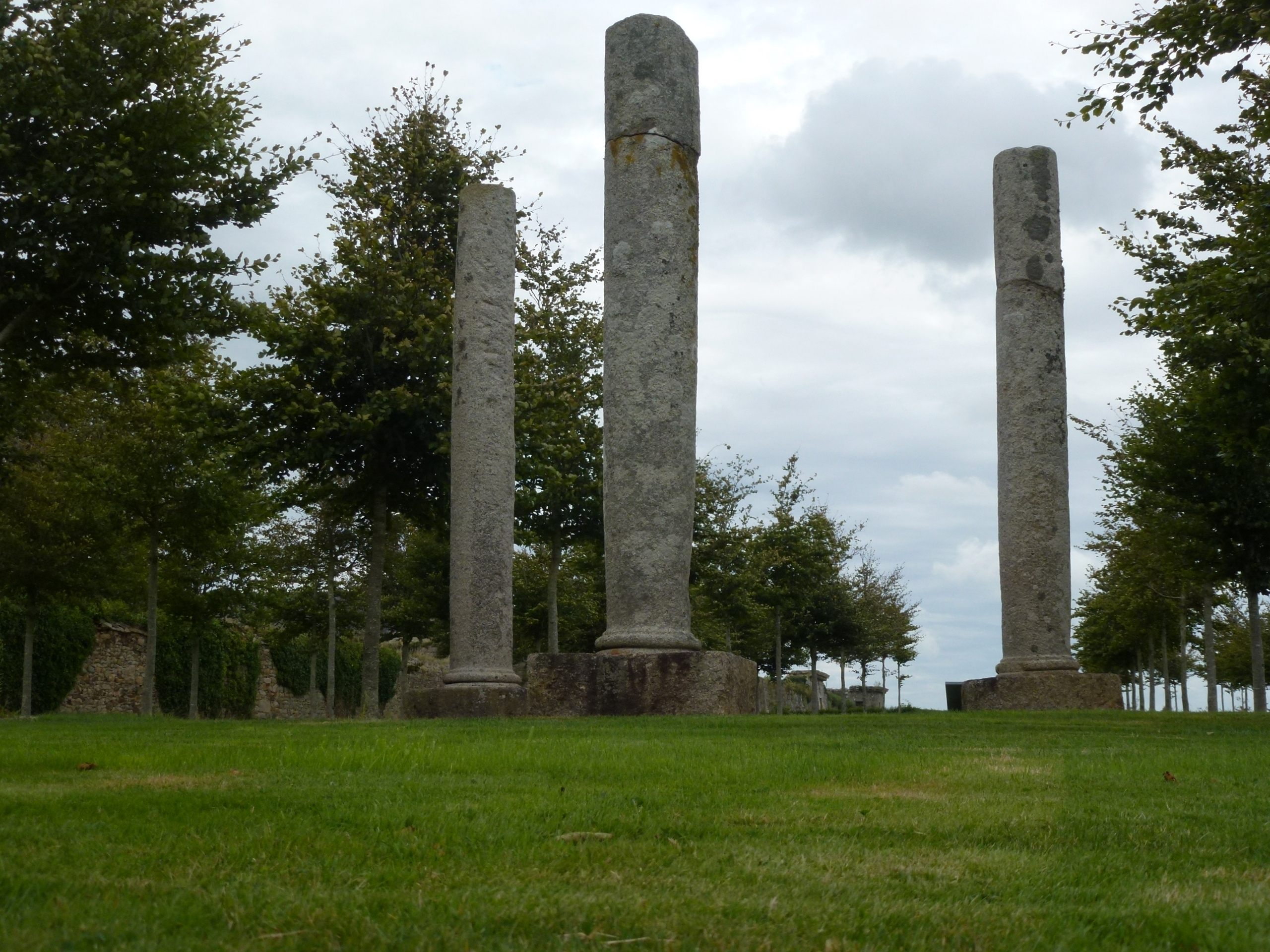 Les poteaux de justice, le seigneur de Kerjean pouvait exercer la haute justice sur ses terres, c’est-à-dire prononcer les peines capitales, et donc condamner à la pendaison.